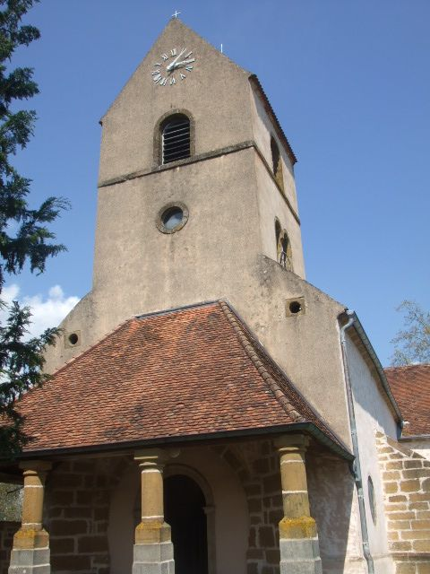 Bourguignon-lès-Conflans, Haute-Saône, France